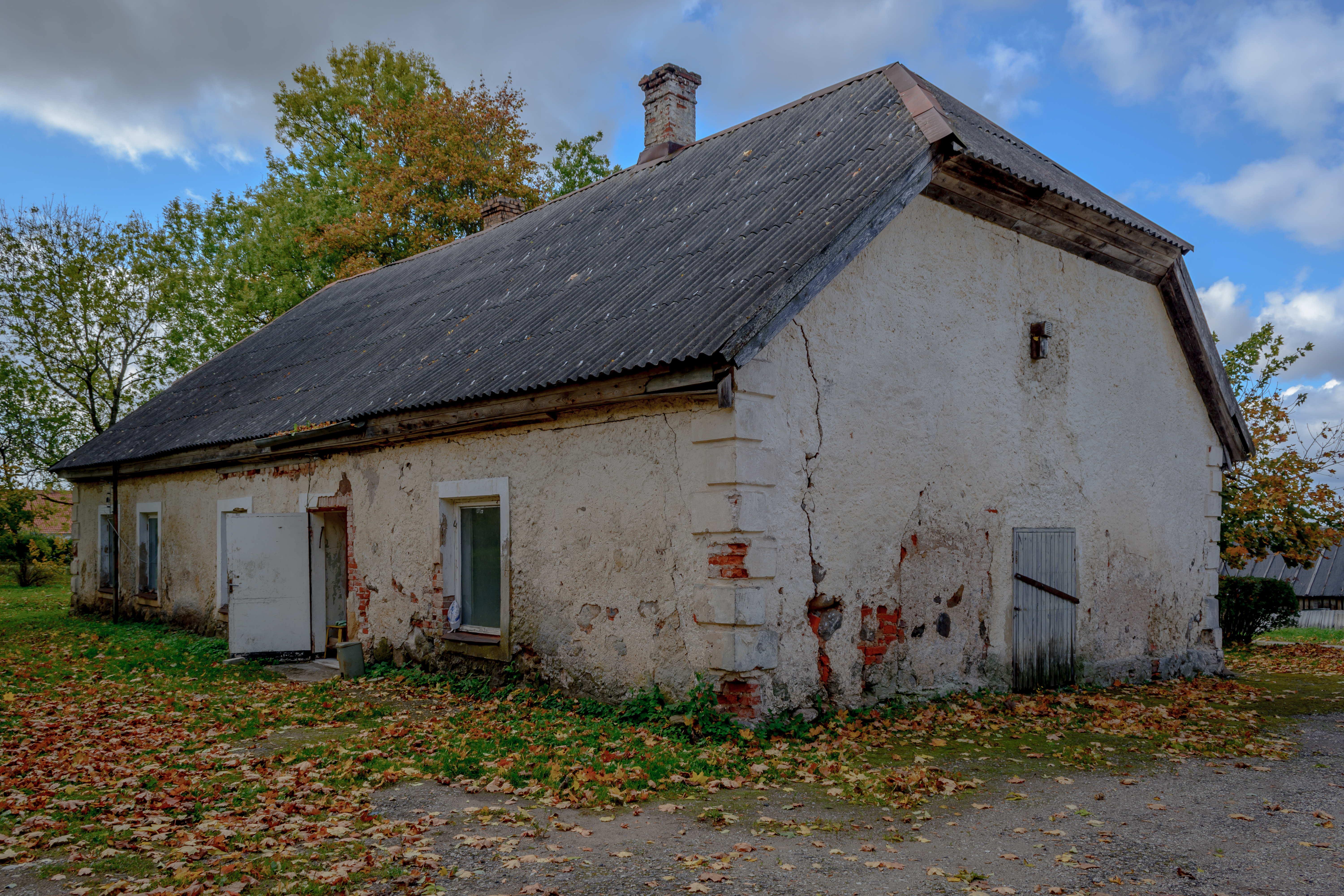 Põlgaste mõisa valitsejamaja